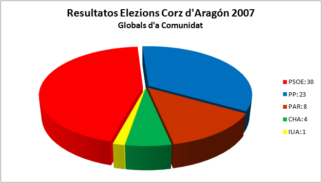 Aragonés: Grafico d'as elezions a Corz d'Aragón de la añada 2007